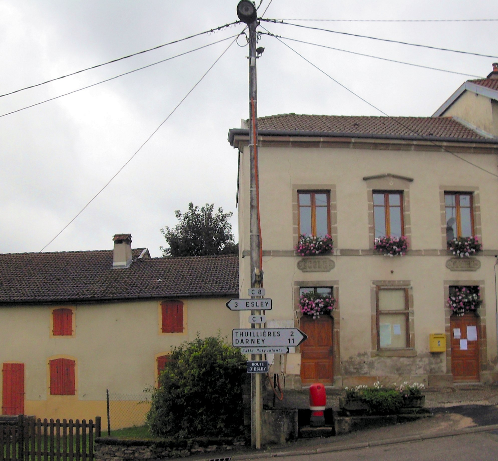 La mairie-école de Monthureux-le-Sec